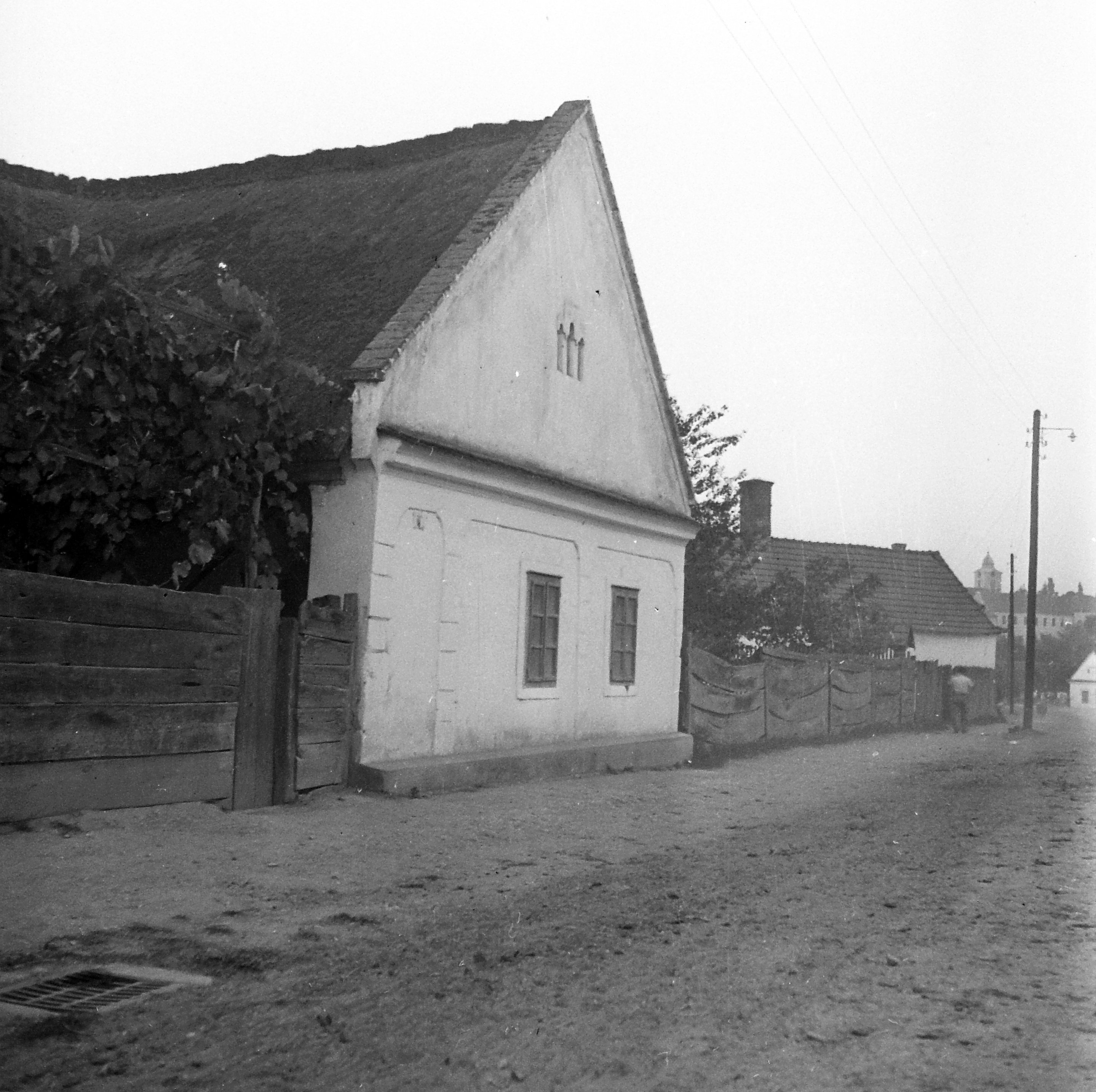 Vasvár Pál utca 14. Jenei Jankó János szülőháza. Location: Hungary Tags: farmhouse Title: Vasvár Pál utca 14. Jenei Jankó János szülőháza.